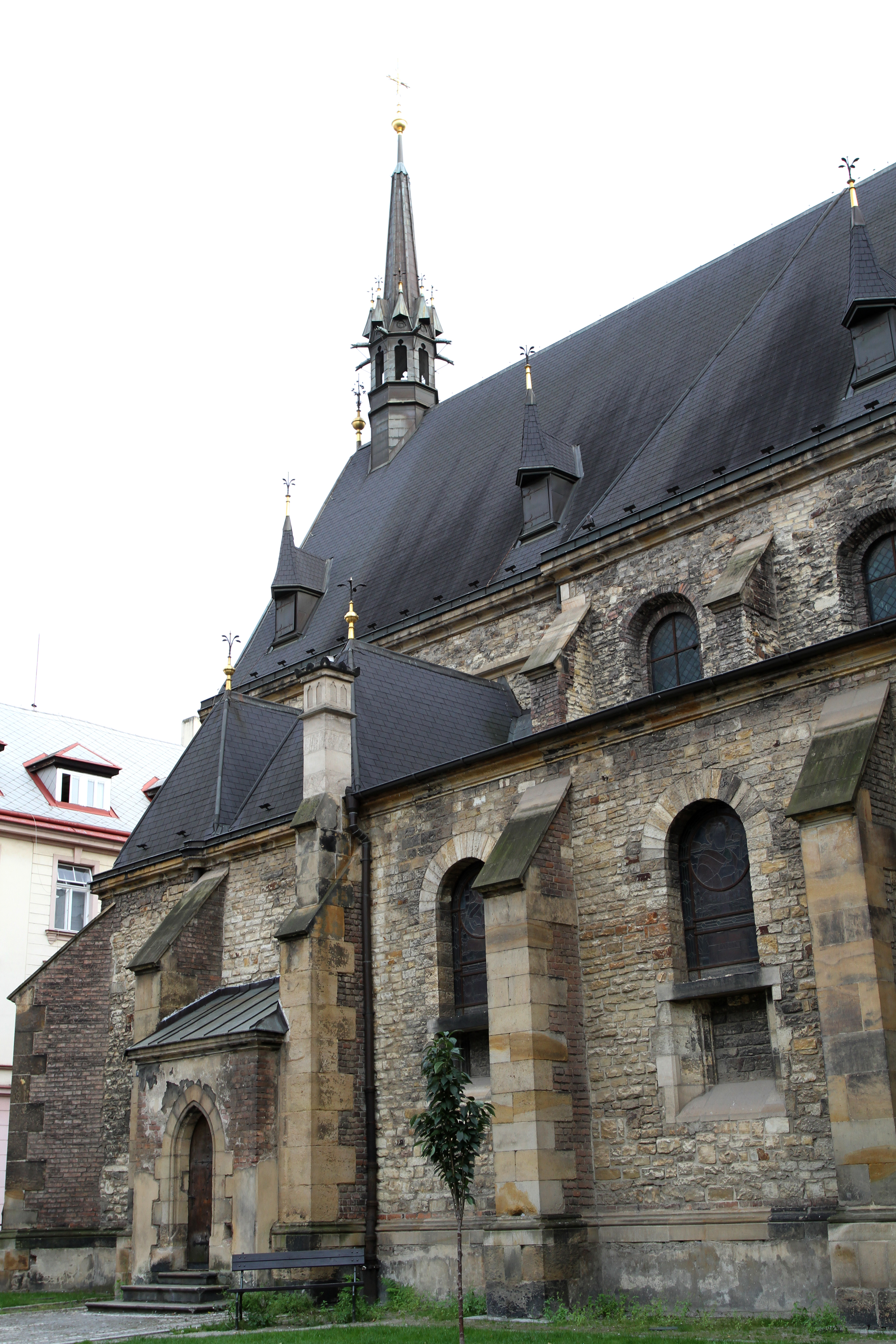 Kostel sv. Petra Na Poříčí (Nové Město), Praha 1, Petrská, zvonice čp. 1232, č. or. 14, Nové Město